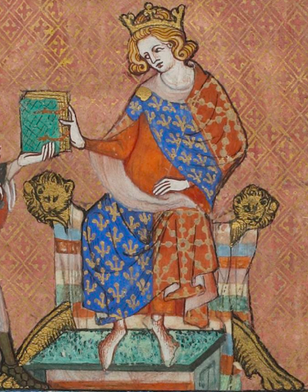 Ludvík X.